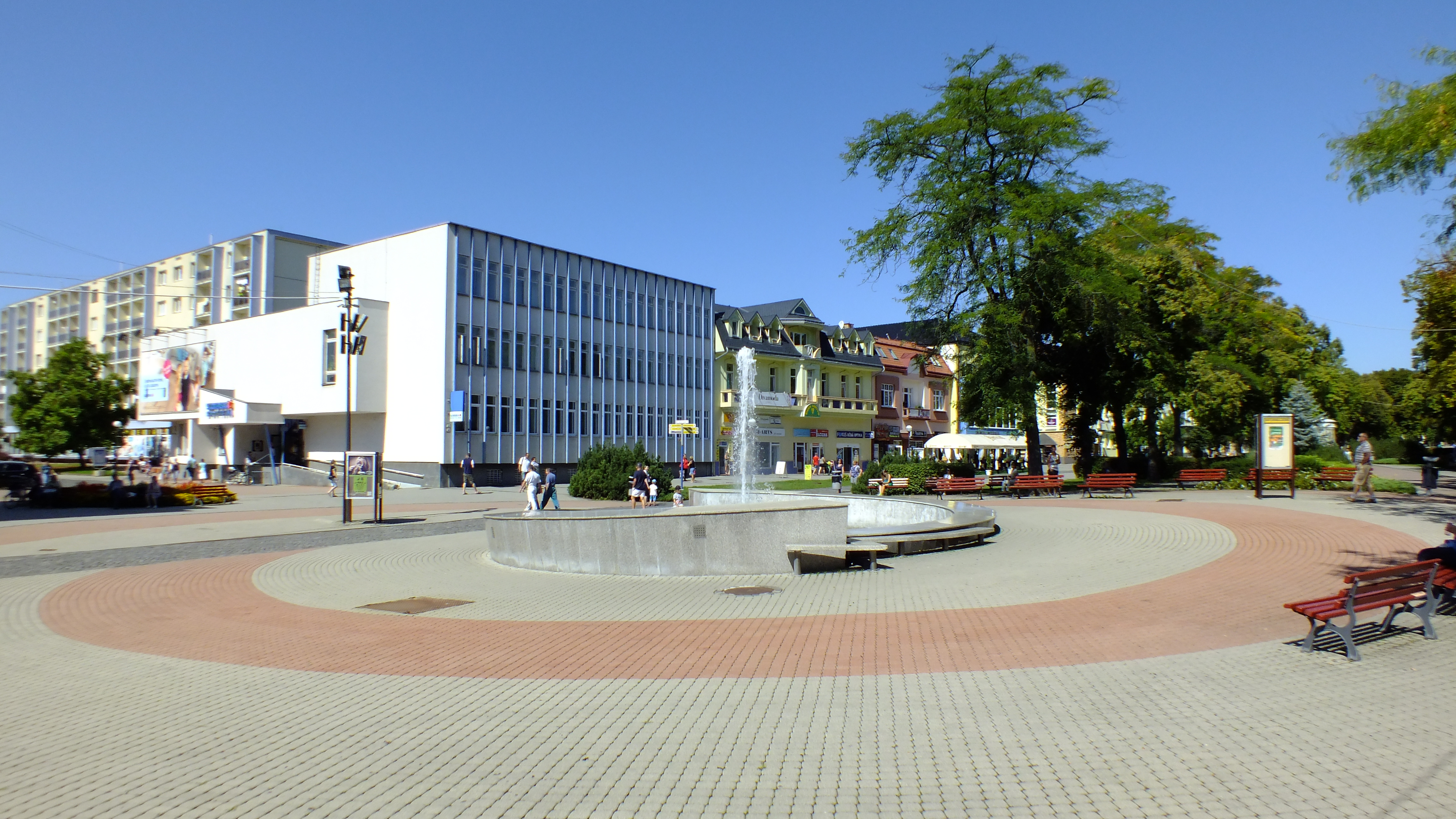 Hlavní náměstí